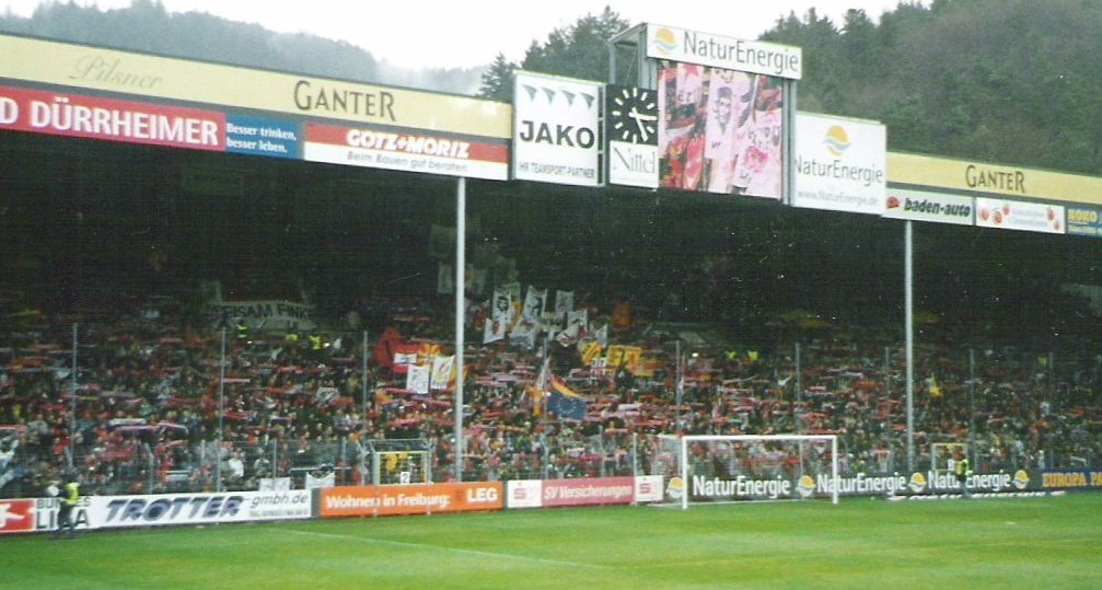 Freiburger Fankurve im Norden des Badenova-Stadions